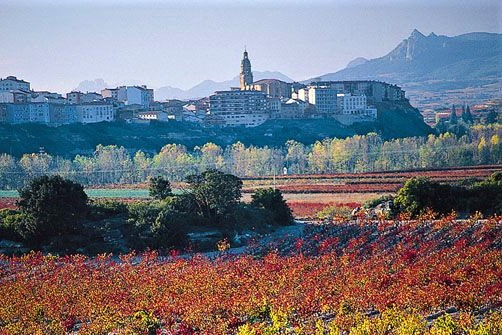 Localidad de Haro y viñedos